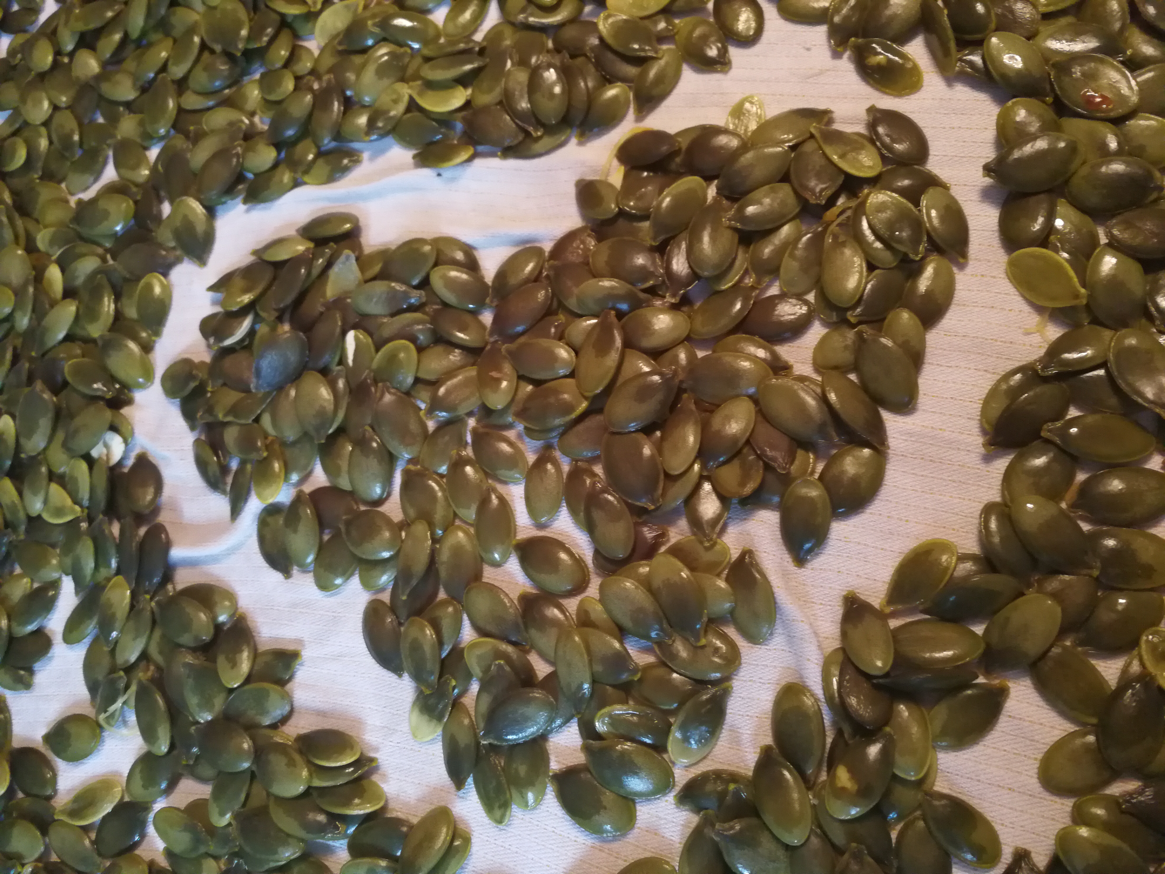 Kürbissamen werden zum Trocken ausgelegt